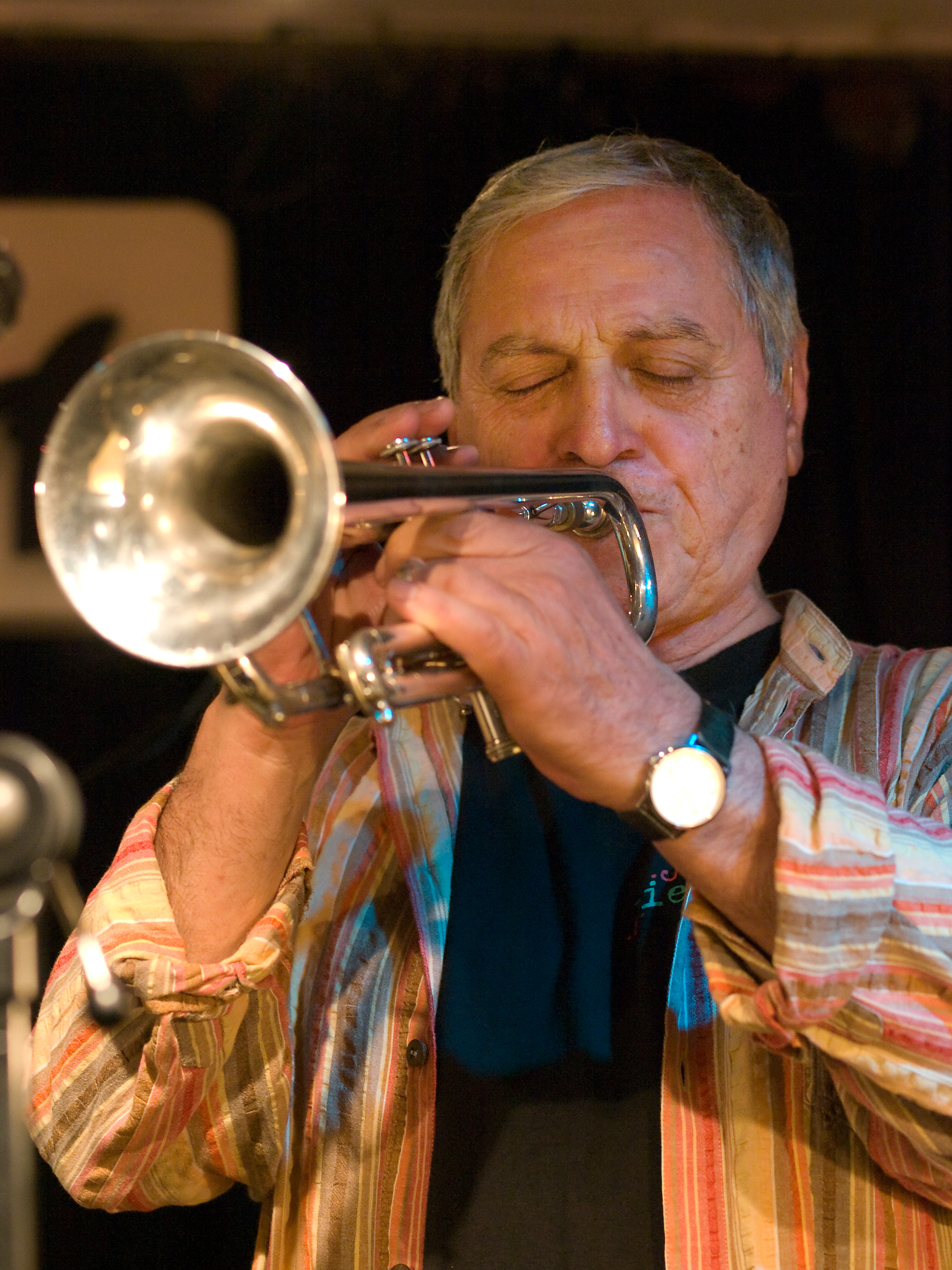 Dušan „Duško“ Gojković, jazz trumpet, picture taken in Jazz club "Unterfahrt" in Munich/Germany